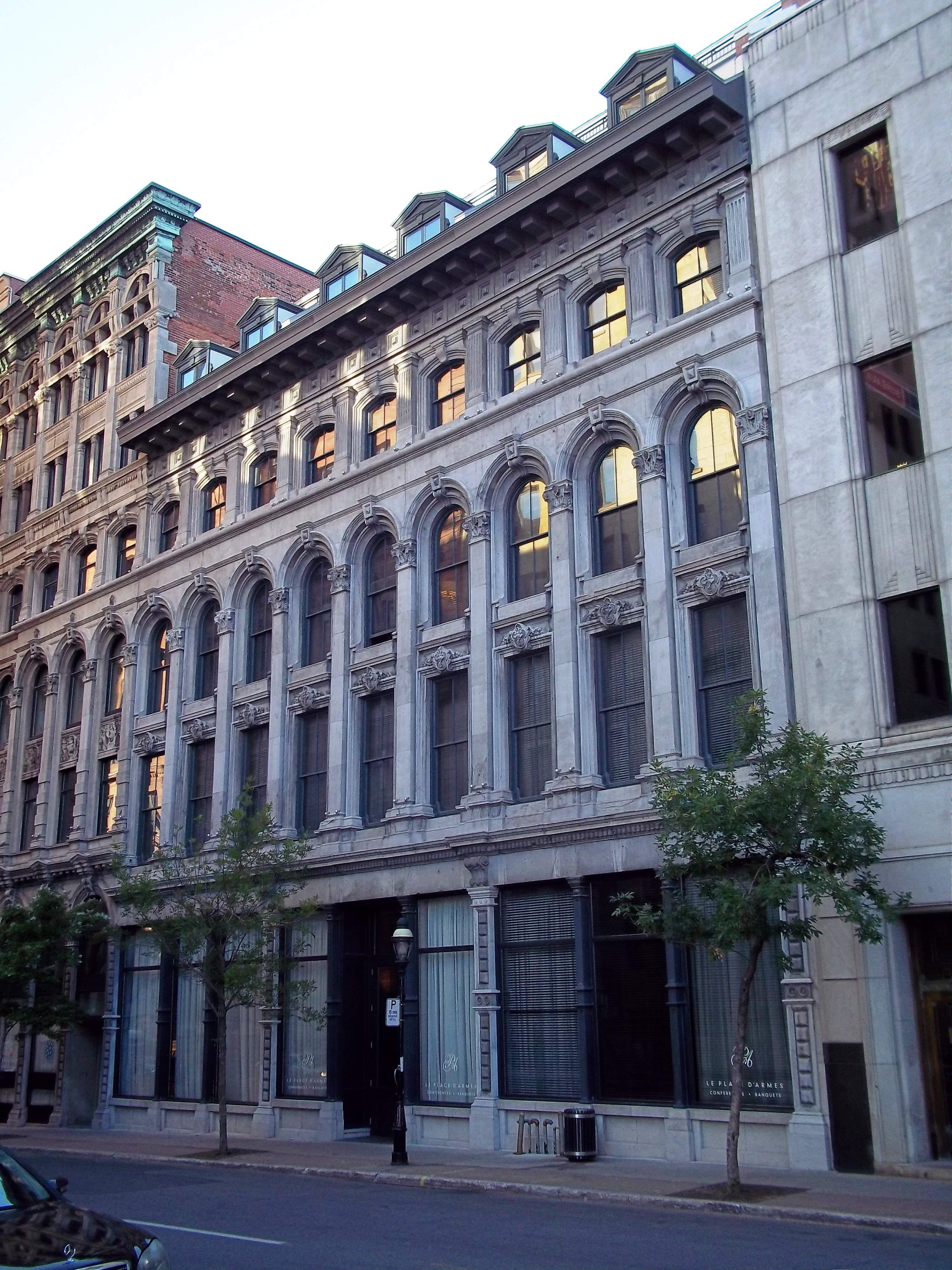 Édifice Alexander-Cross, 43-51, rue Saint-Jacques, Montréal.